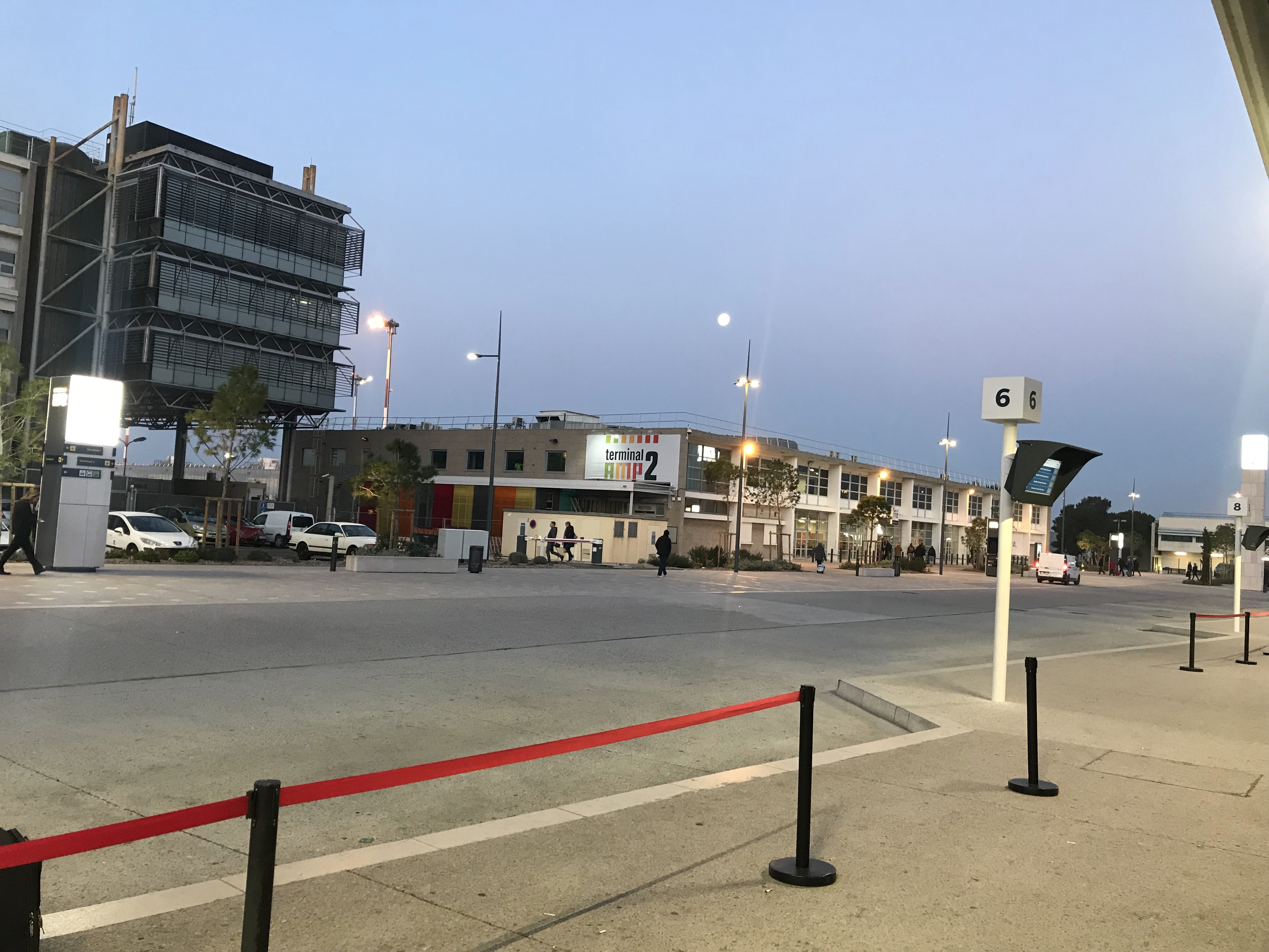 Terminal 2